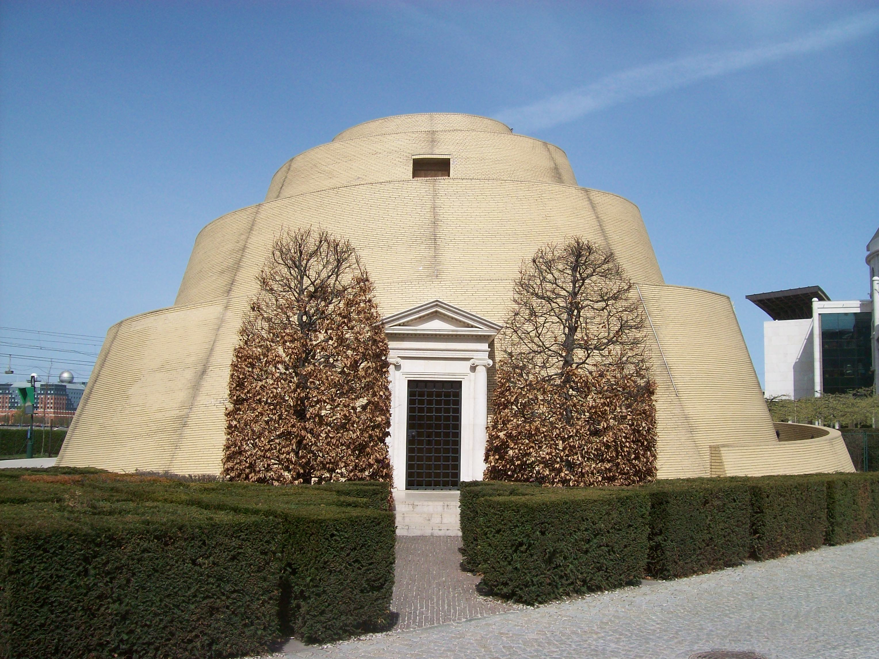 A budapesti Zikkurat Galéria bejárata (Budapest-Ferencváros)